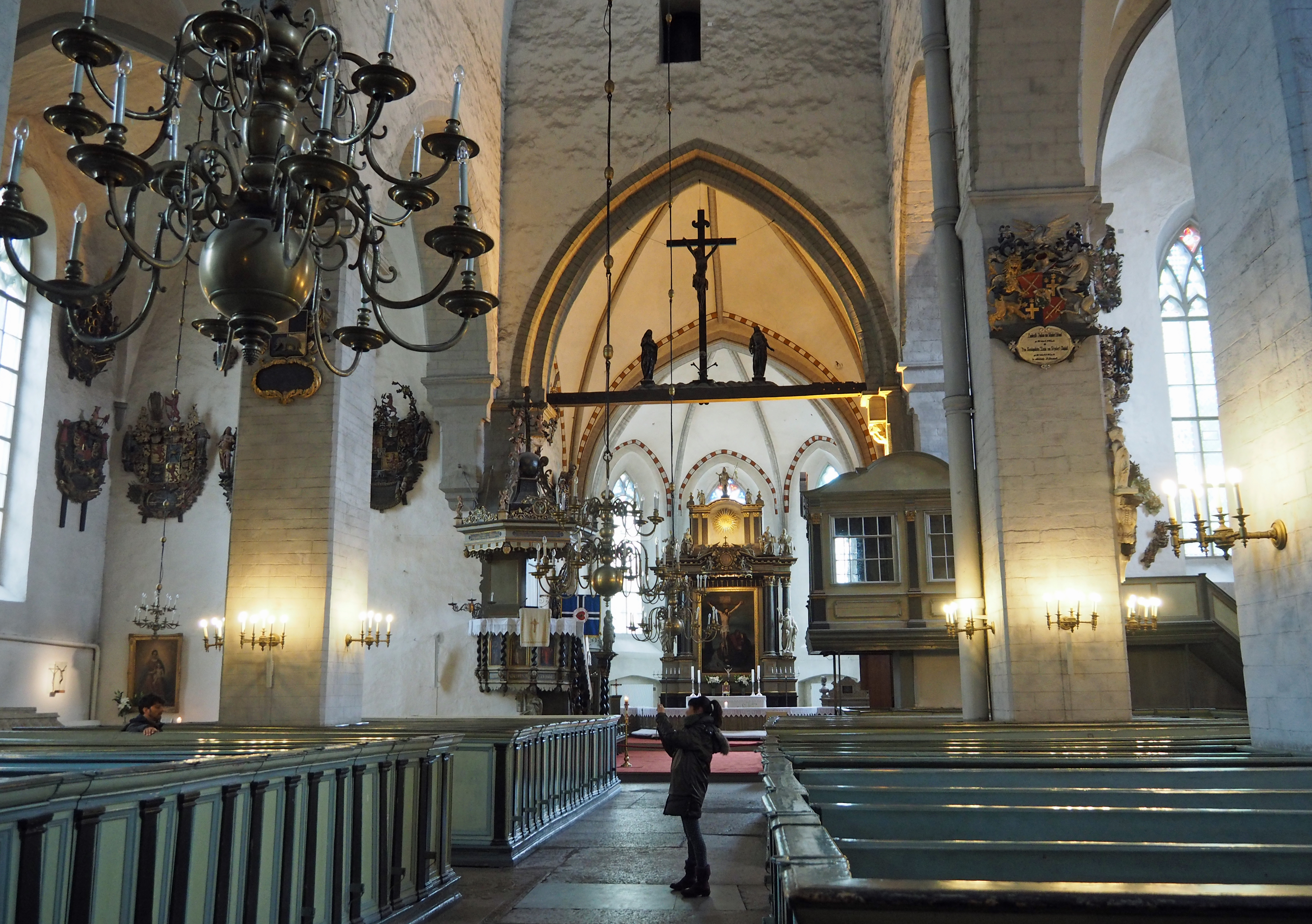 Tallinner Dom zu St. Marien, Innenraum mit Altar